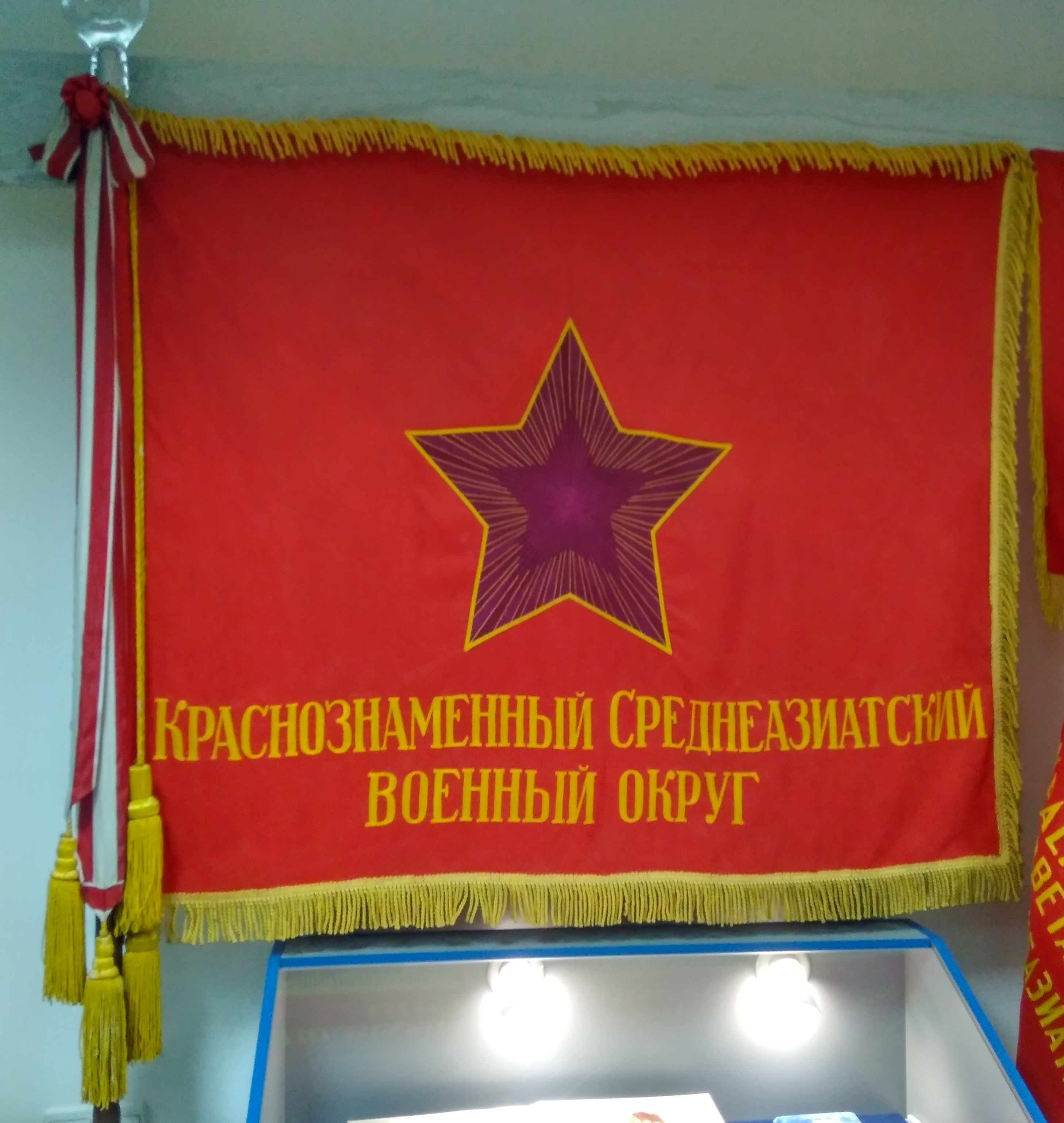 Экспозиция в музее Дома офицеров в Алматы